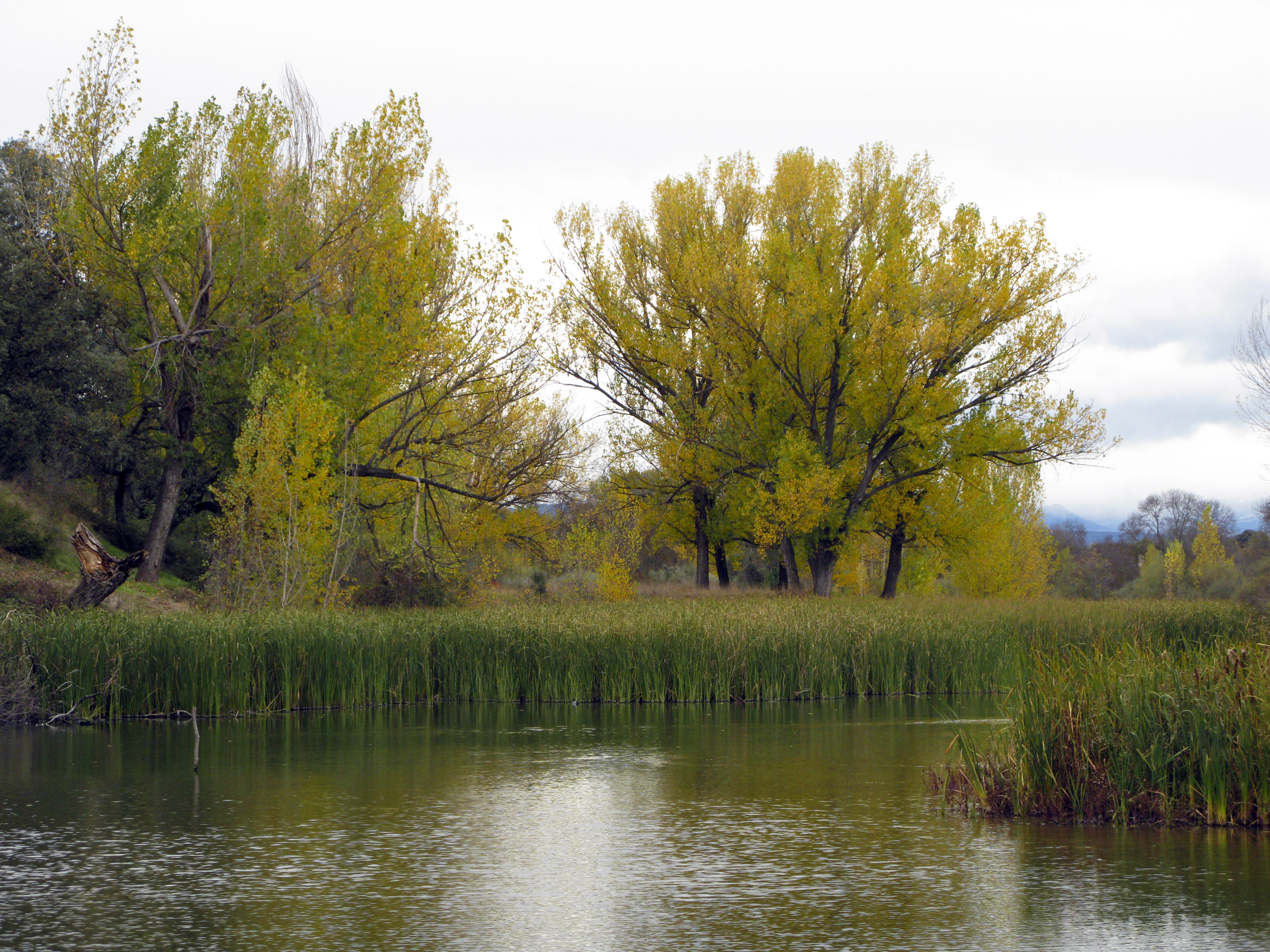 Cuenca del río Manzanares- Monte del Pardo This is a photography of a Special Area of Conservation in Spain with the ID: ES3110004. Natura2000 entry, EEA entry